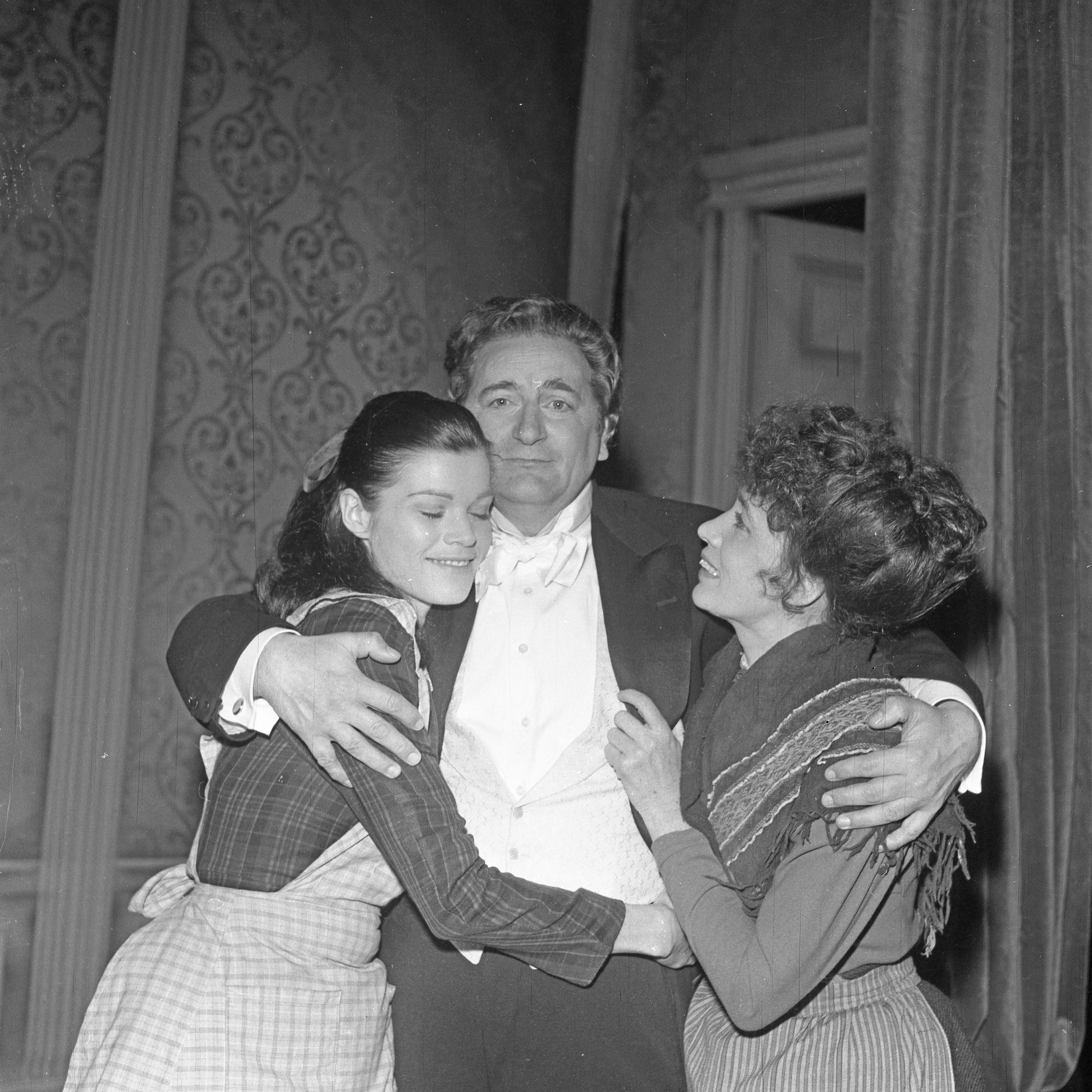 Format: 120 mm sort/hvitt negativ Dato / Date: Mai 1967 Fotograf / Photographer: Eirik Sundvor (1902 - 1992) Sted / Place: Den Nationale Scene, Bergen, Hordaland Depicted people: Bergljot Engeset, Rolf Berntzen and Karin Simonnæs Eier / Owner Institution: Trondheim byarkiv, The Municipal Archives of Trondheim Arkivreferanse / Archive reference: Tor.H43.B78.F14639 Avisreferanser: Bergens Tidende 23 Mai 1967 s. 4, Bergens Tidende 26 Mai 1967 s. 5, Aftenposten 26 Mai 1967 s. 5. Merknad / Description Fra oppsetningen av Vildanden ved Den Nationale Scene i Bergen 1967. Fra venstre mot høyre Bergljot Engeseth som Hedvig Ekdal, Rolf Berntzen som Hjalmar Ekdal og Karin Simonnæs som Gina Ekdal. / From The Wild Duck by Henrik Ibsen at Den Nationale Scene in Bergen in 1967. Bergljot Engeseth as Hedvig Ekdal, Rolf Berntzen as Hjalmar Ekdal and Karin Simonnæs as Gina Ekdal.